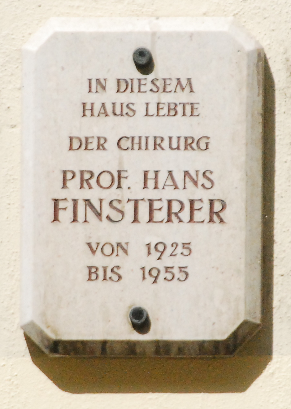 Gedenktafel für Hans Finsterer in der Garnisonsgasse 7 in Wien-Alsergrund